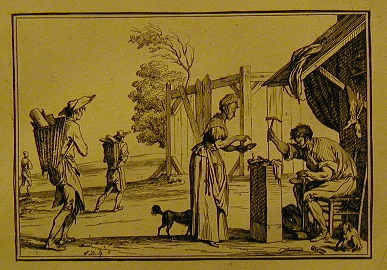 Cipész Párizsban (rézmetszet)